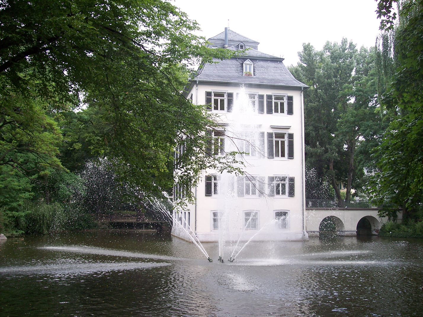 Holzhausen-Schlösschen, Frankfurt am Main